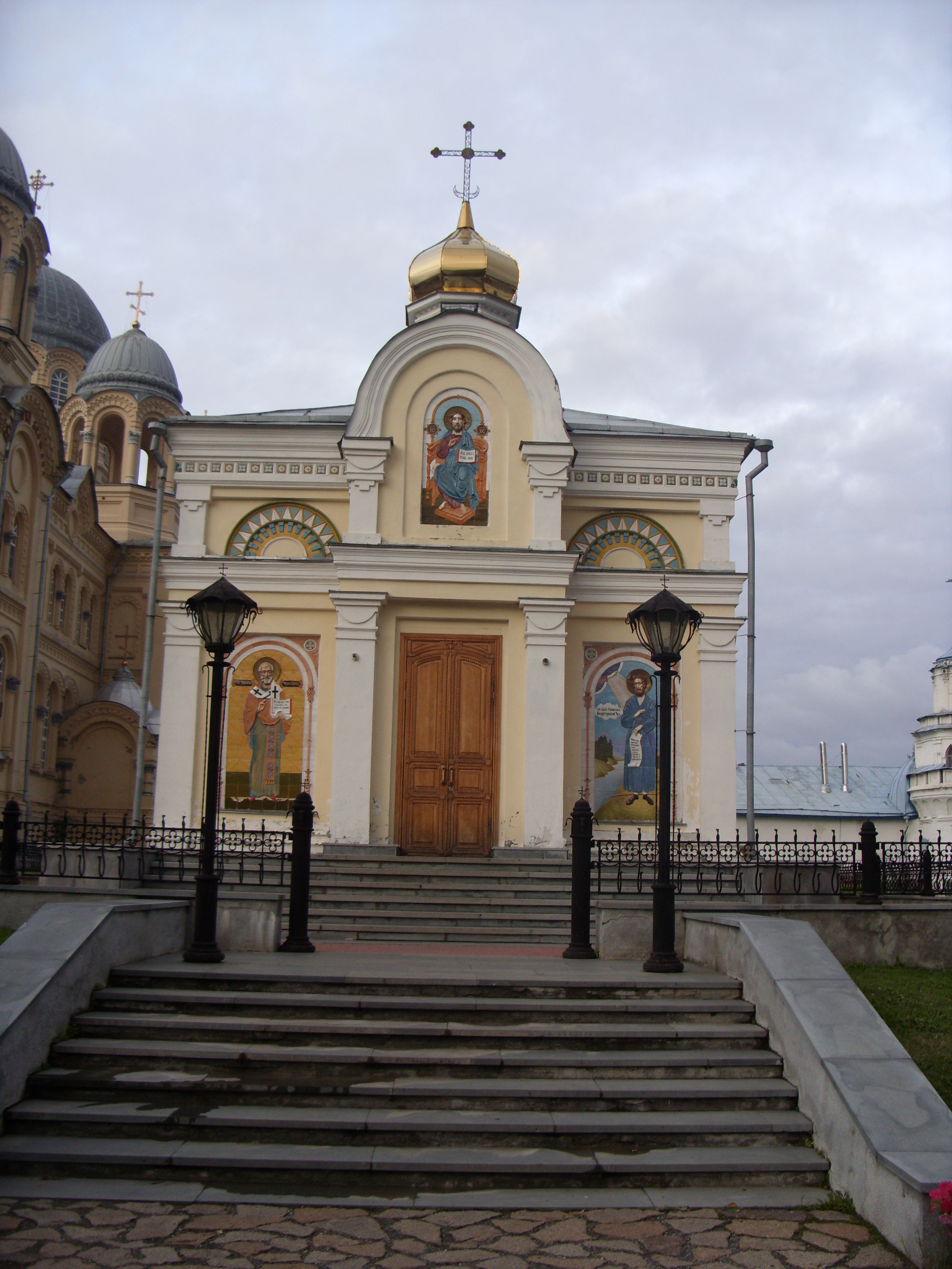 Церковь Николая Чудотворца Николаевского монастыря в Верхотурье